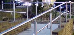 Pochylnia stal nierdzewna